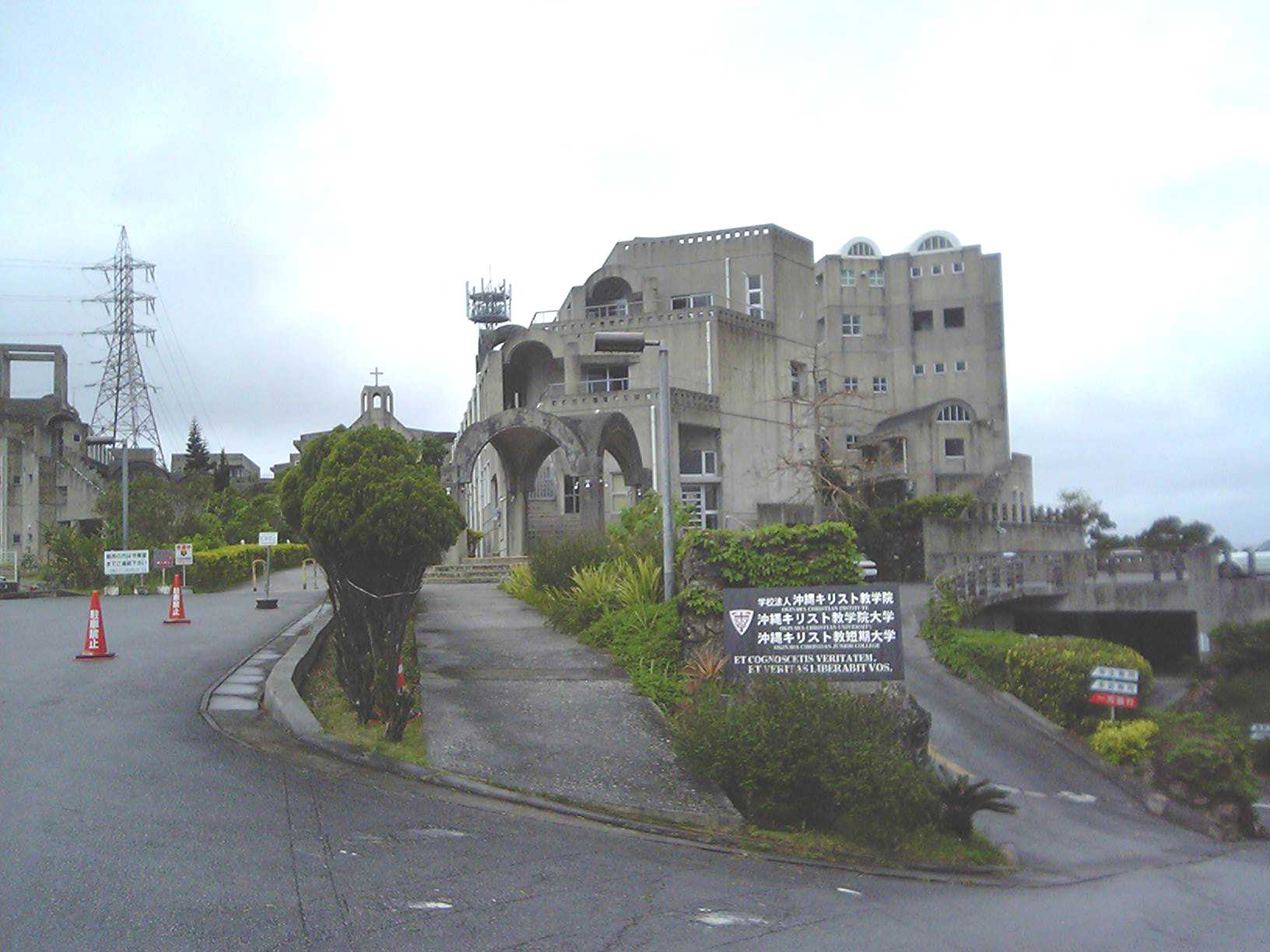 沖縄キリスト教学院大学